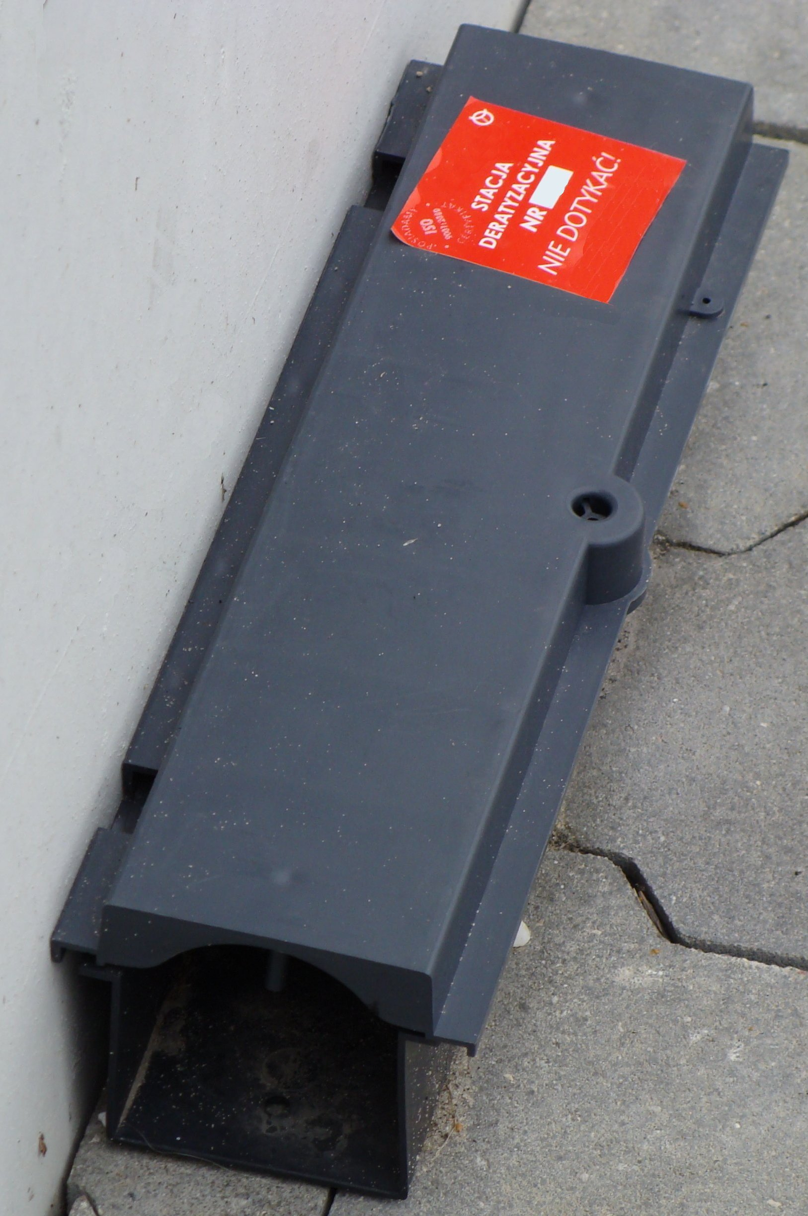 Pojemnik do wykładania zatrutej karmy dla gryzoni - deratyzacja